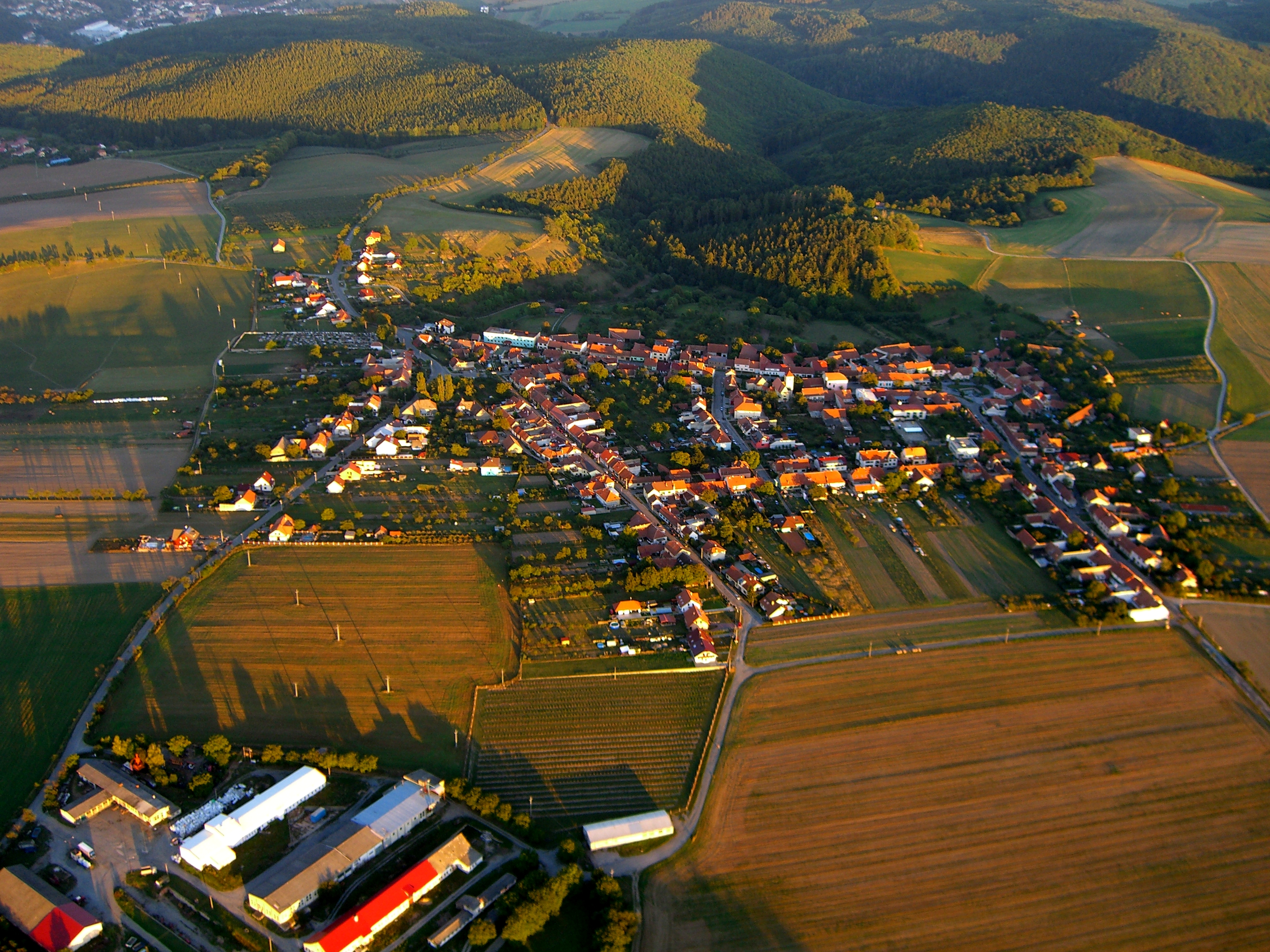 Lažánky, pohled z horkovzdušného balónu.